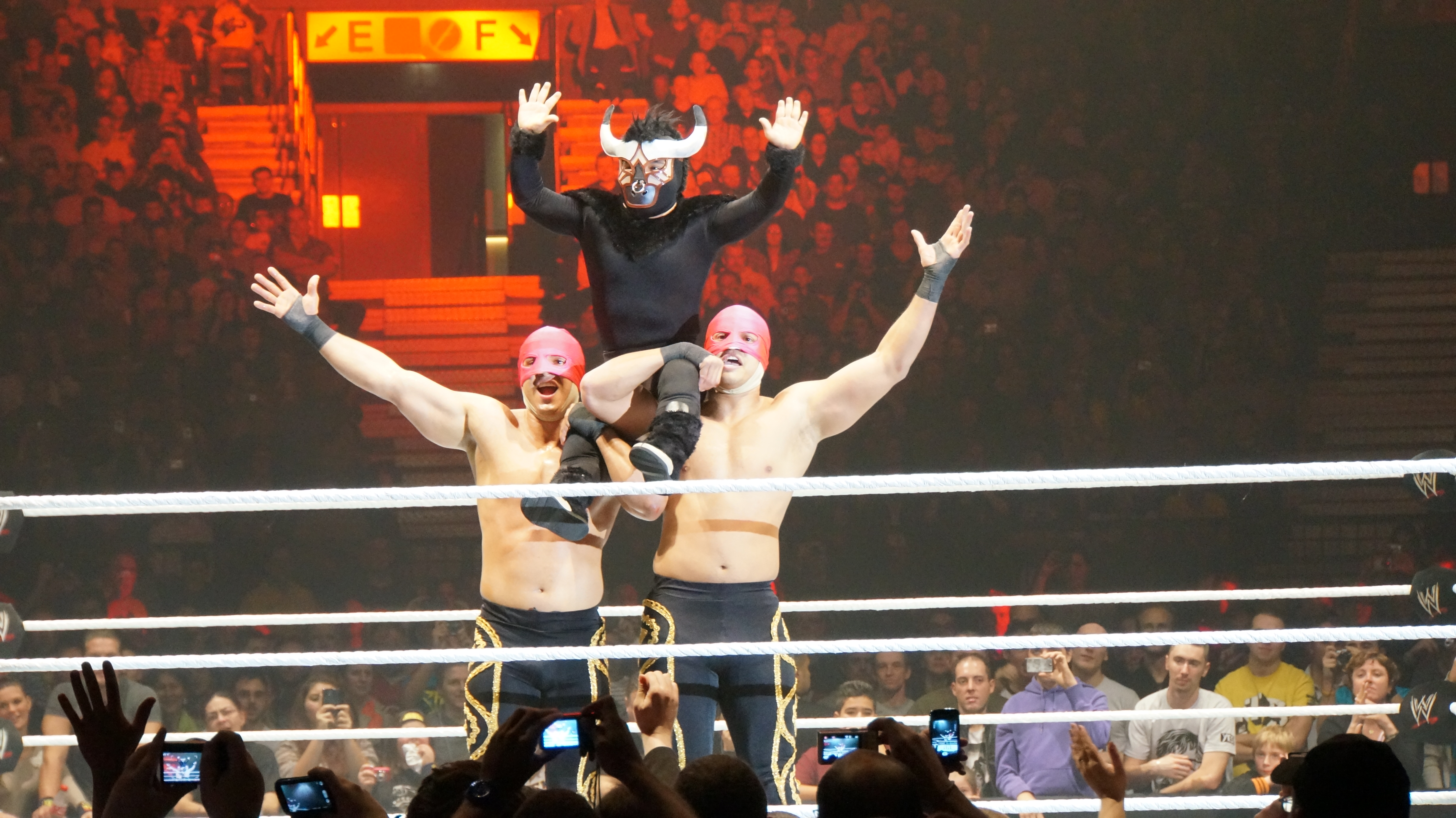 2013-11-08_22-06-16_NEX-6_DSC08366